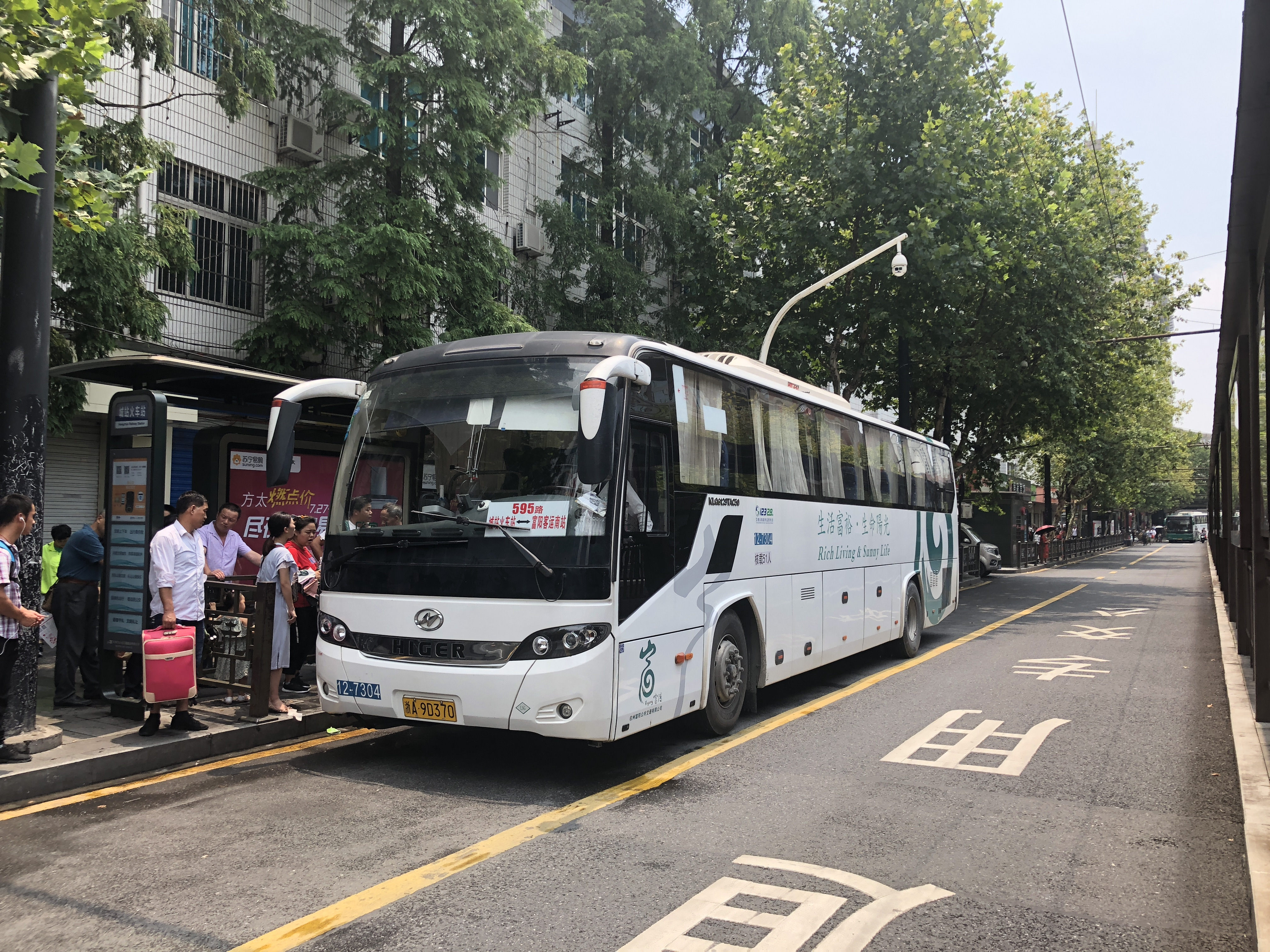 中文（中国大陆）: 杭州595